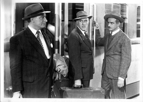 Fotografía en blanco y negro sobre papel fotográfico mate, con marco perimetral blanco. Escena de la película La campana nueva (1950), con guion de Carlos Alberto Orlando sobre la pieza teatral Don Fernández de Ivo Pelay. Escena en el andén de una estación ferroviaria donde aparecen de izquierda a derecha, de medio cuerpo: un actor con traje y sombrero; Adolfo Linvel sosteniendo una valija y Pedro Quartucci tomado de la baranda de un vagón.